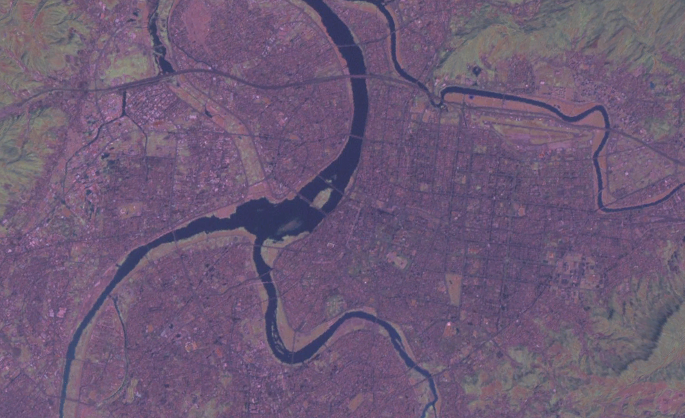 臺北衛星圖像